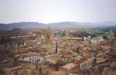 Albalate desde la Moreria